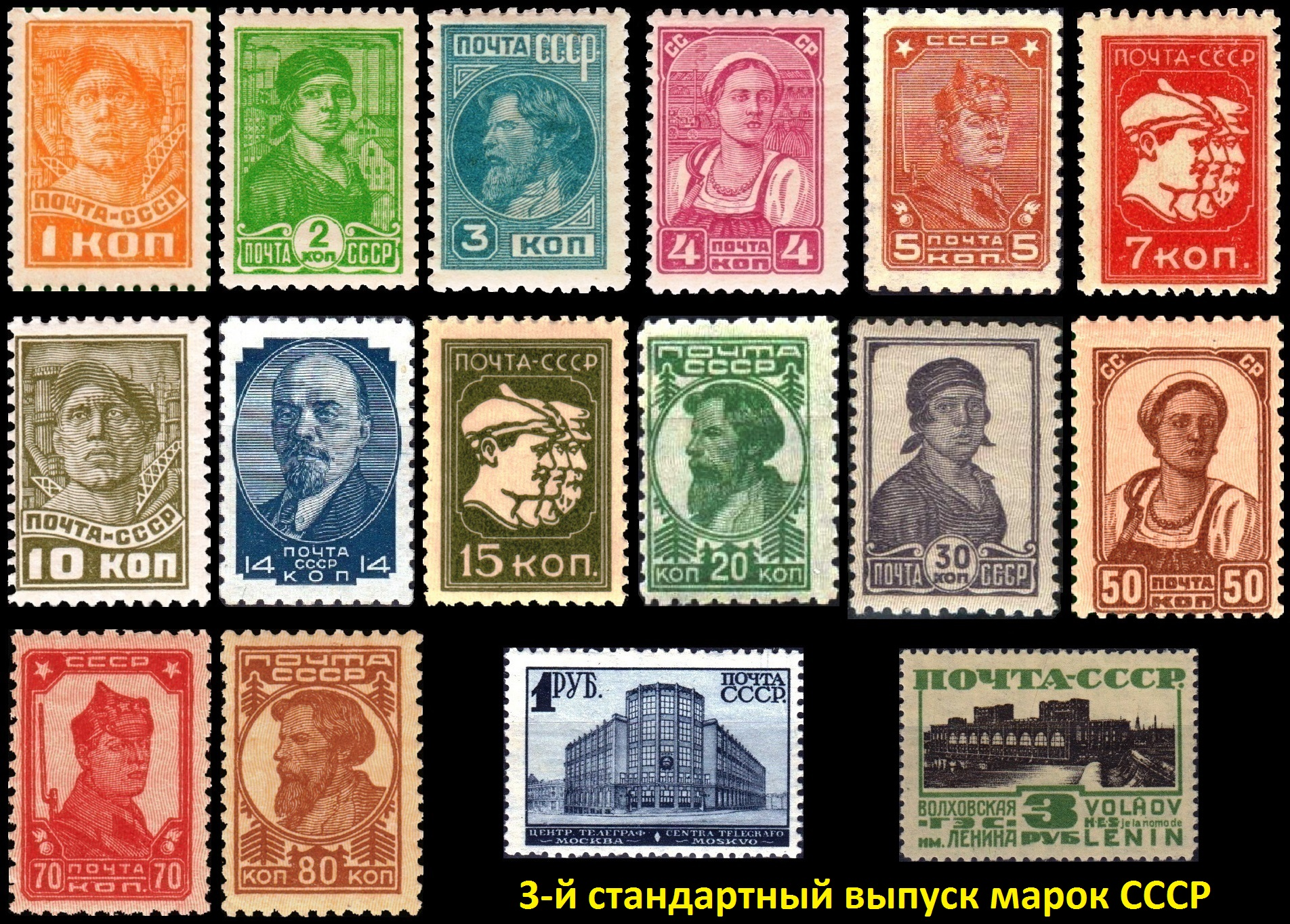 Почто́вые ма́рки тре́тьей станда́ртной се́рии СССР (1929—1941) начали поступать в обращение с августа 1929 года. Марки этой серии печатались типографским способом и способом глубокой печати на бумаге с водяными знаками и без них, с гребенчатой (16 номиналов) и линейной (5 номиналов) зубцовкой. Затем марки этого выпуска переиздавались и дополнялись до января 1941 года.